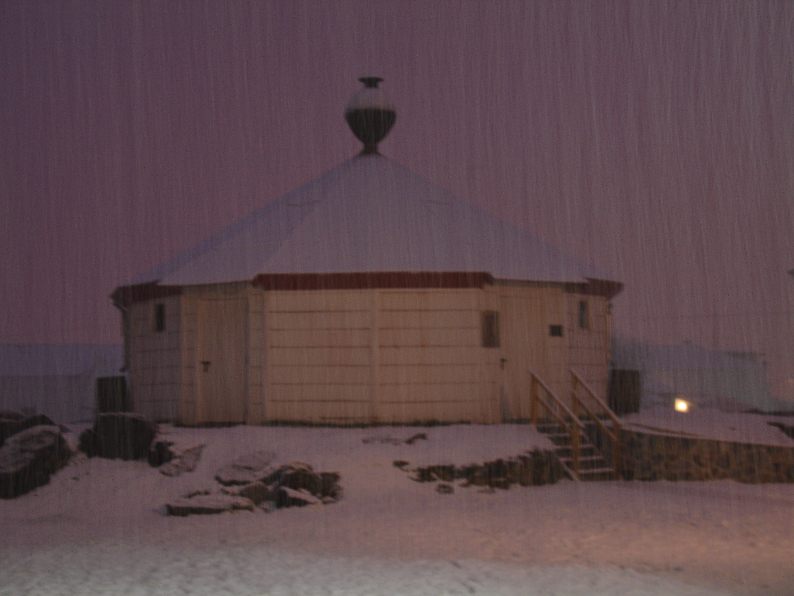 Réplica en escala 1:1 del faro. Museo Marítimo y ex presidio de Ushuaia